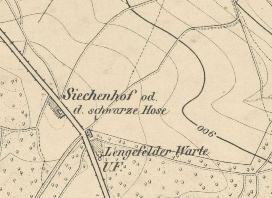 Siechenhaus oder Schwarze Hose, Gem. Helmsdorf, Landkreis Eichsfeld, Thüringen, Ausschnitt aus dem Meßtischblatt 1: 25.000 Nr.4728 Mühlhausen von 1868 (alte Nr. 2740)